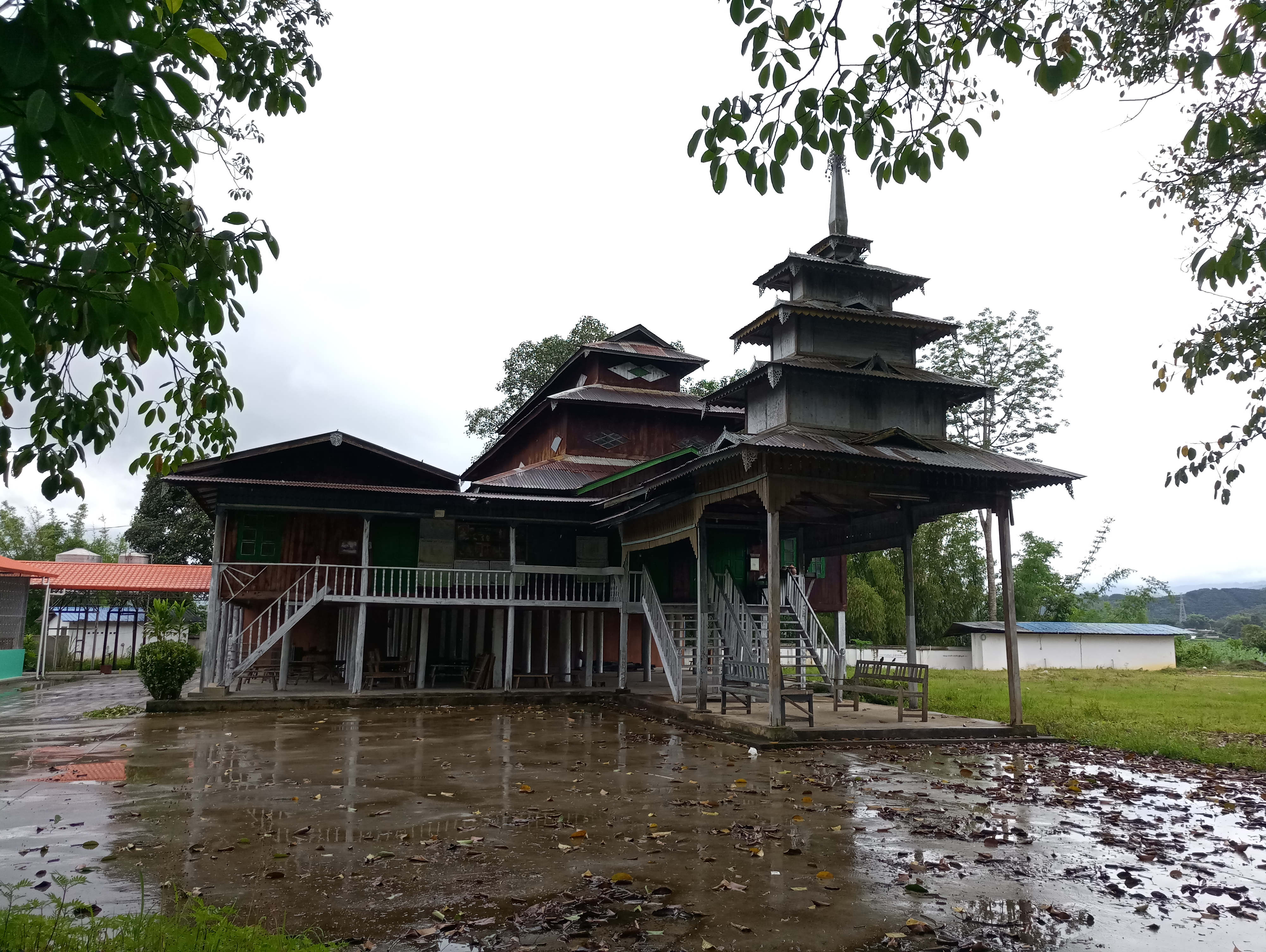 中文（中国大陆）: 雷允村奘房